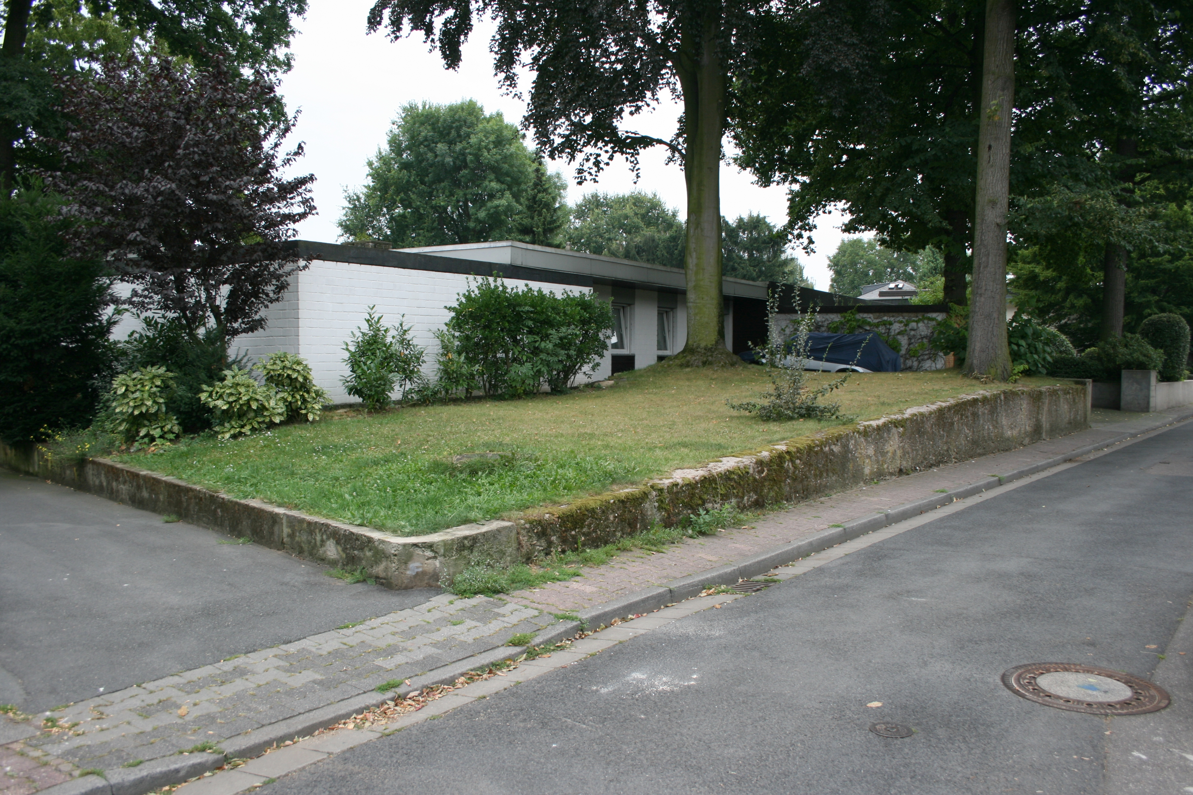 Nida-Heddernheim, letzter erhaltener Rest der römischen Stadtmauer - ein Erdwall vor dem Haus Am Forum 29.